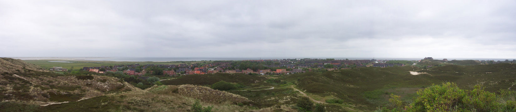 list_sylt_panorama